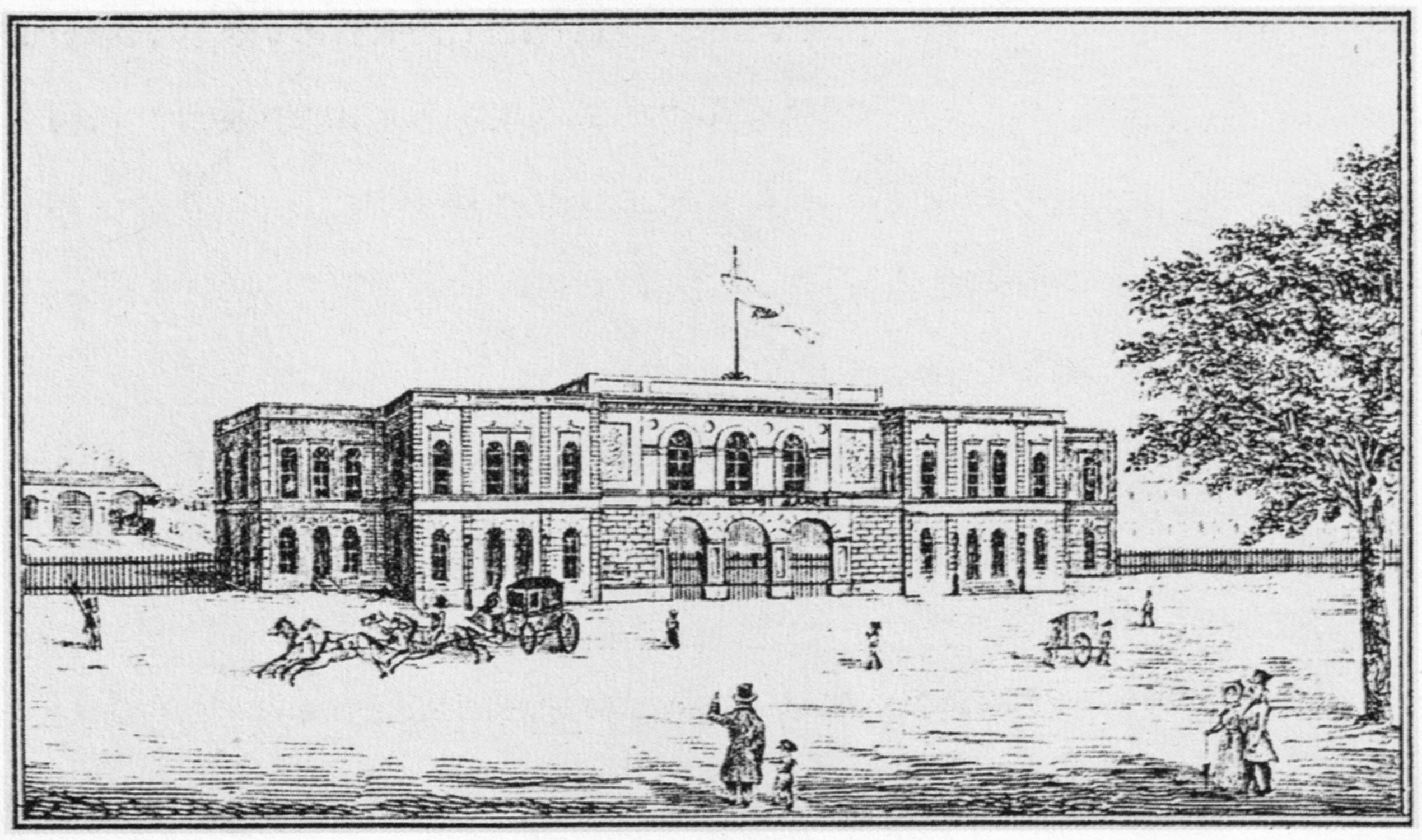 Der Altonaer Bahnhof der Altona-Kieler Eisenbahn-Gesellschaft im Jahr 1844)